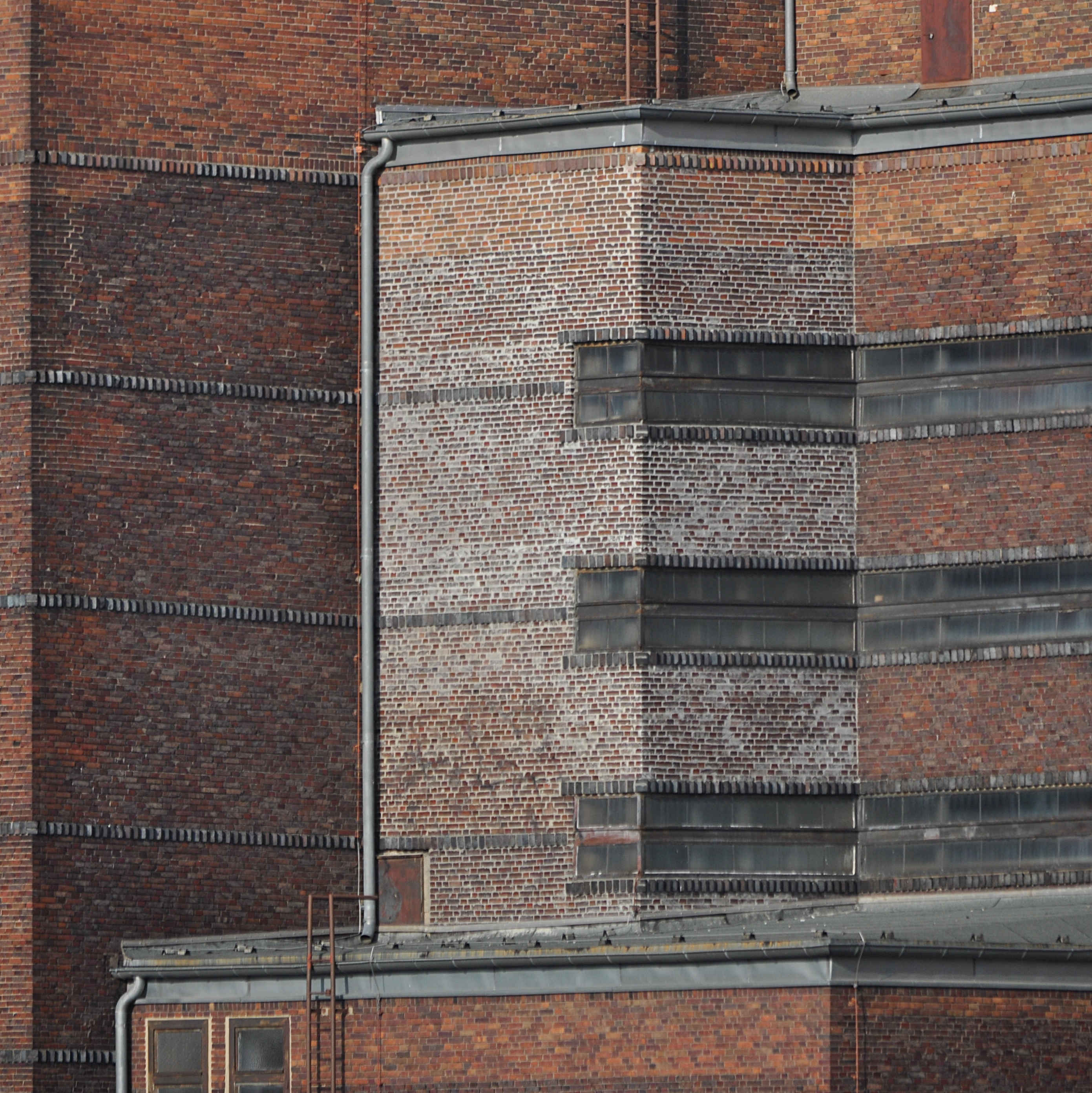 Detail der Stadthalle Magdeburg in Magdeburg-Werder. This is a photograph of an architectural monument.It is on the list of cultural monuments of Magdeburg